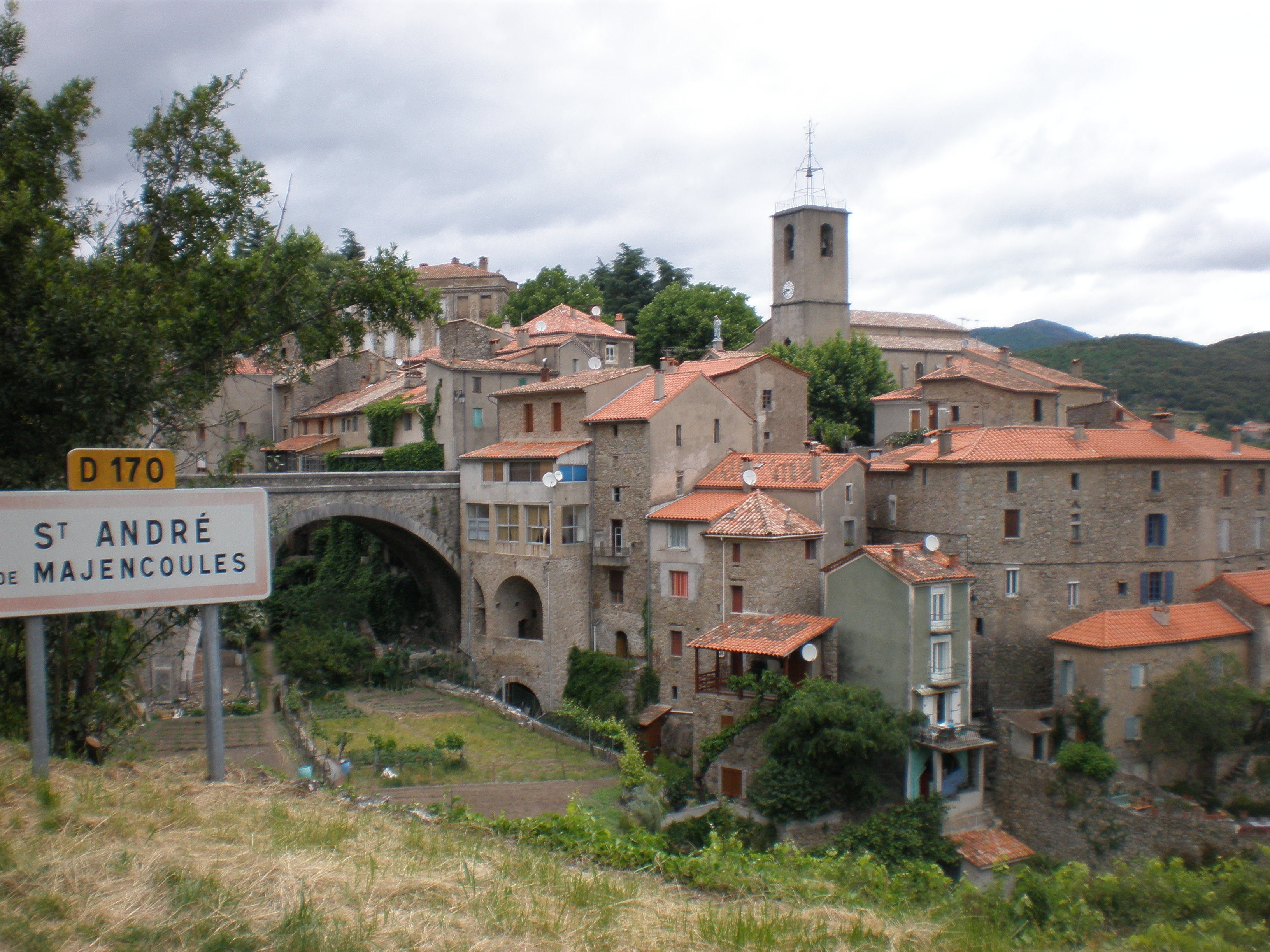 Le village de Saint-André de Majencoules (Gard)